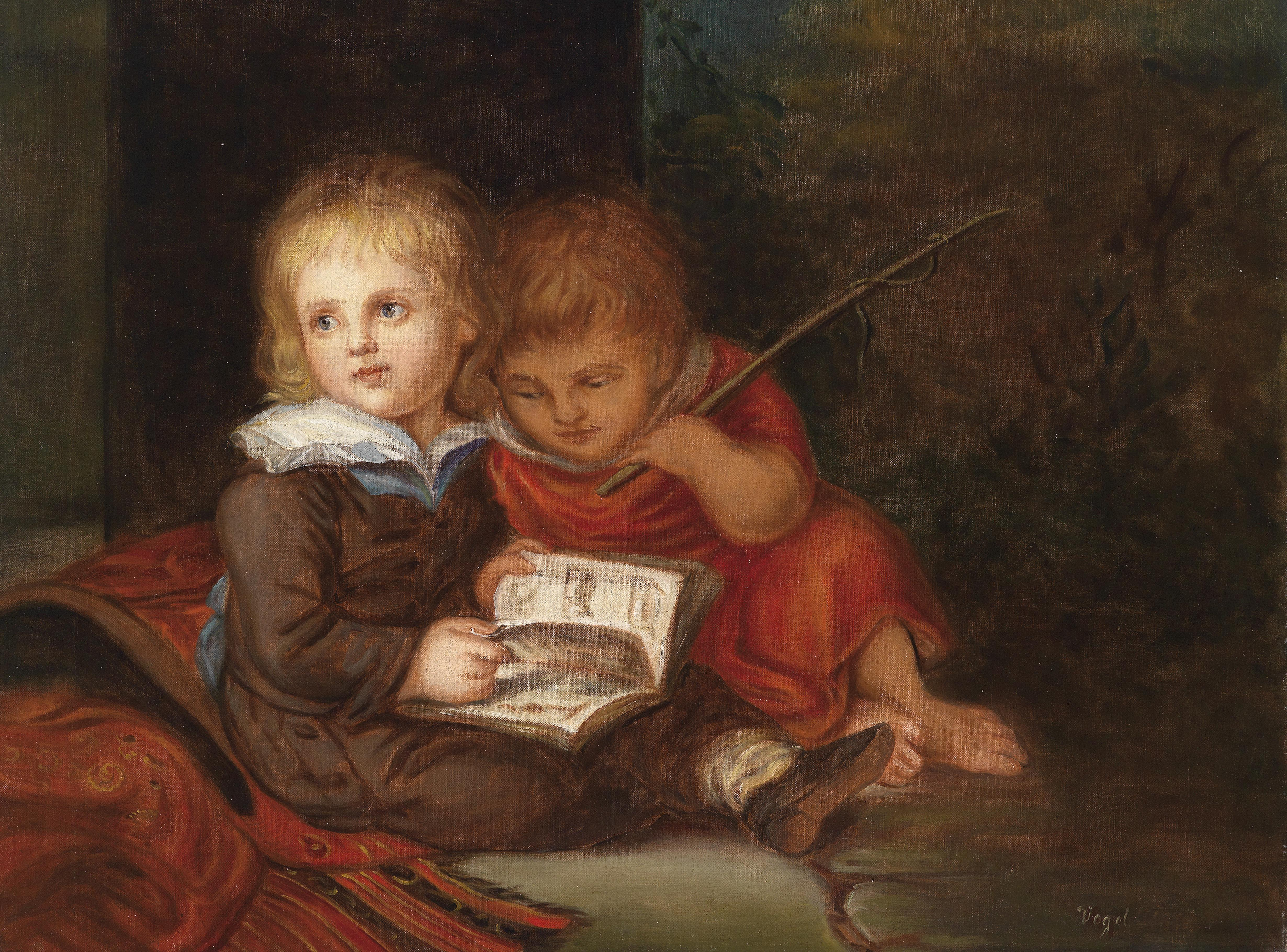 der spätere Maler Carl Christian Vogel und der jüngere Sohn Friedrich Vogel; mit einem Bilderbuch; eine von angeblich 18 eigenhändigen Versionen